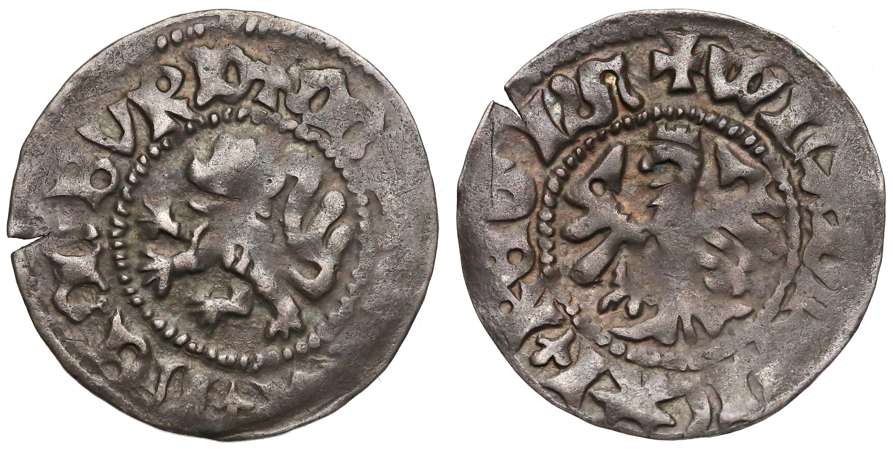 Półgrosz koronny Władysław Jagiełło Lwów